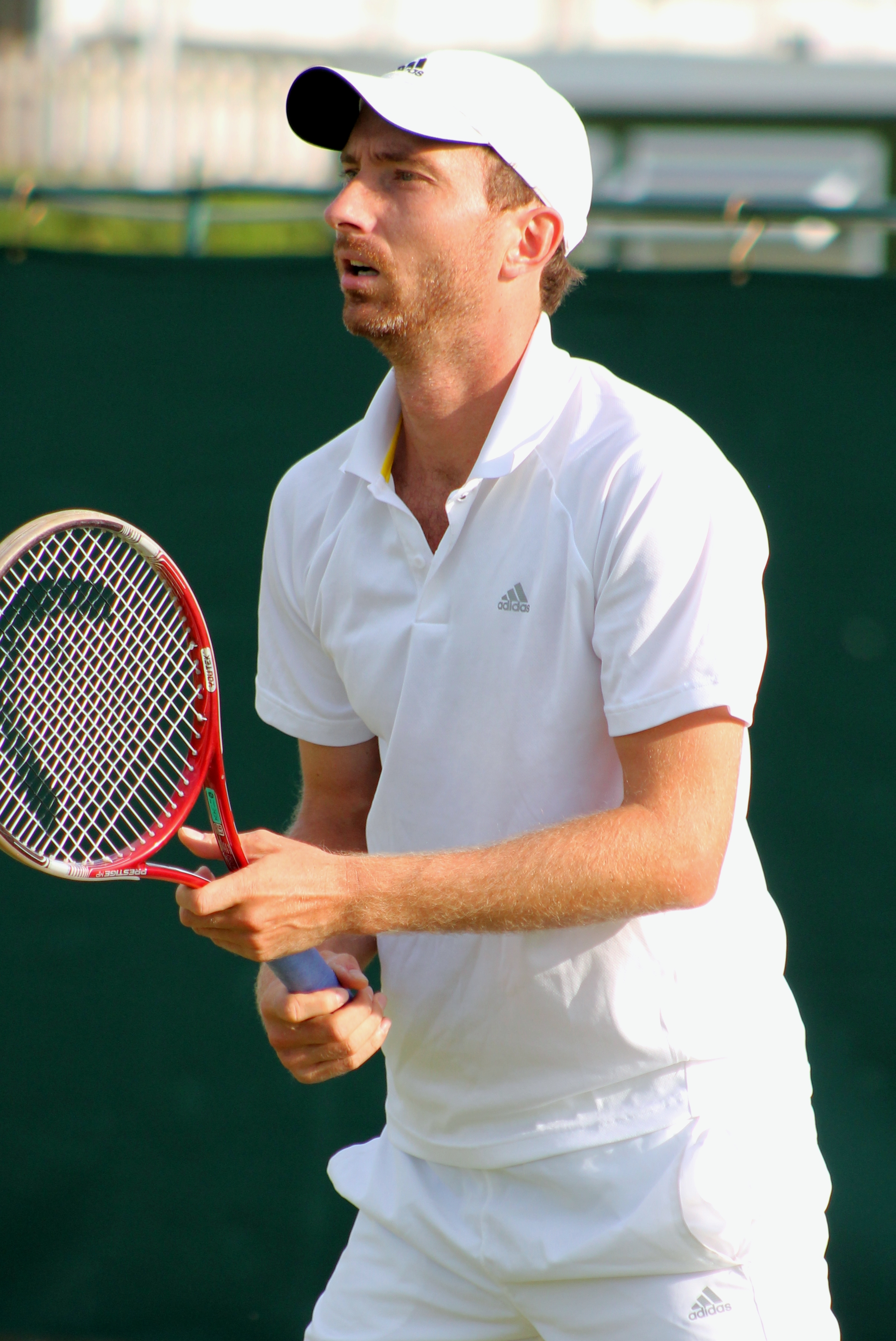 Middelkoop WMQ15 (12)